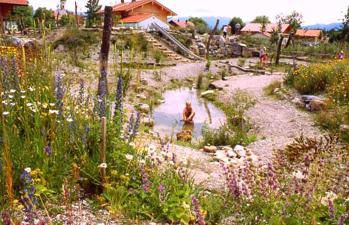 Überblick vom Baumhaus auf den Natur-Erlebnis-Spielplatz Eglfing mit Wildblumenhügeln, Feuerplatz, Wasserspielgelände, Holzschnitzereien, Felsenkletterwand, Burgberg.